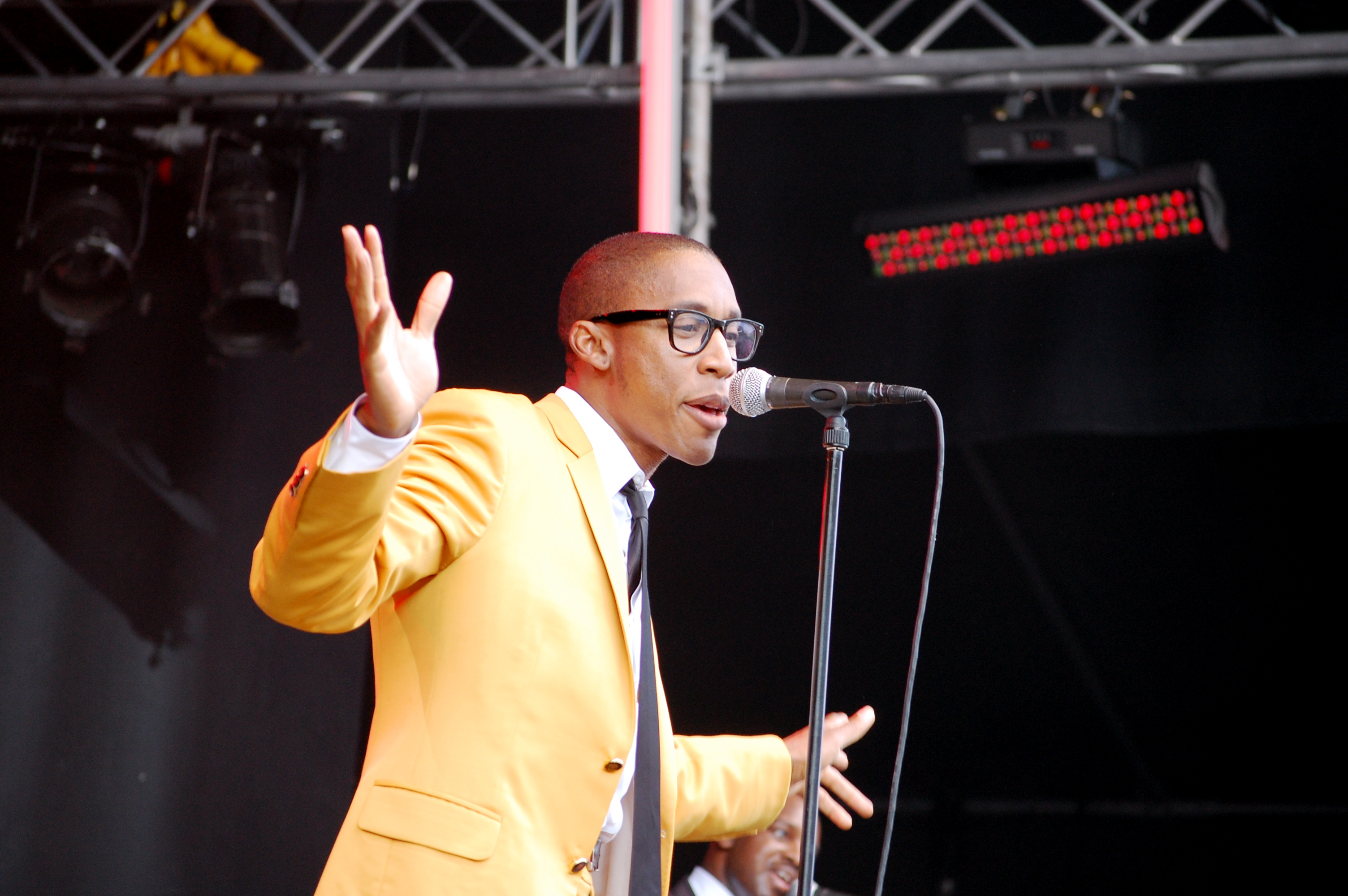 Raphael Saadiq performing at the 2009 Stockholm Jazz Festival, Stockholm, Sweden.